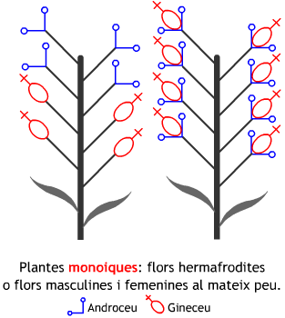 Esquema de distribució de les flors a les plantes monoiques.